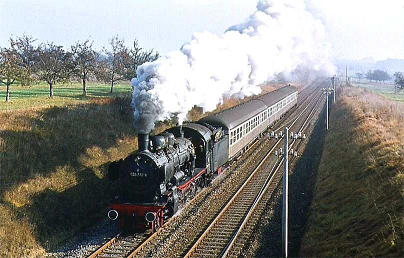 Dampflok 038 772 (ex 38 1772) am 03.11.1973 auf der Gäubahn bei Hochdorf.